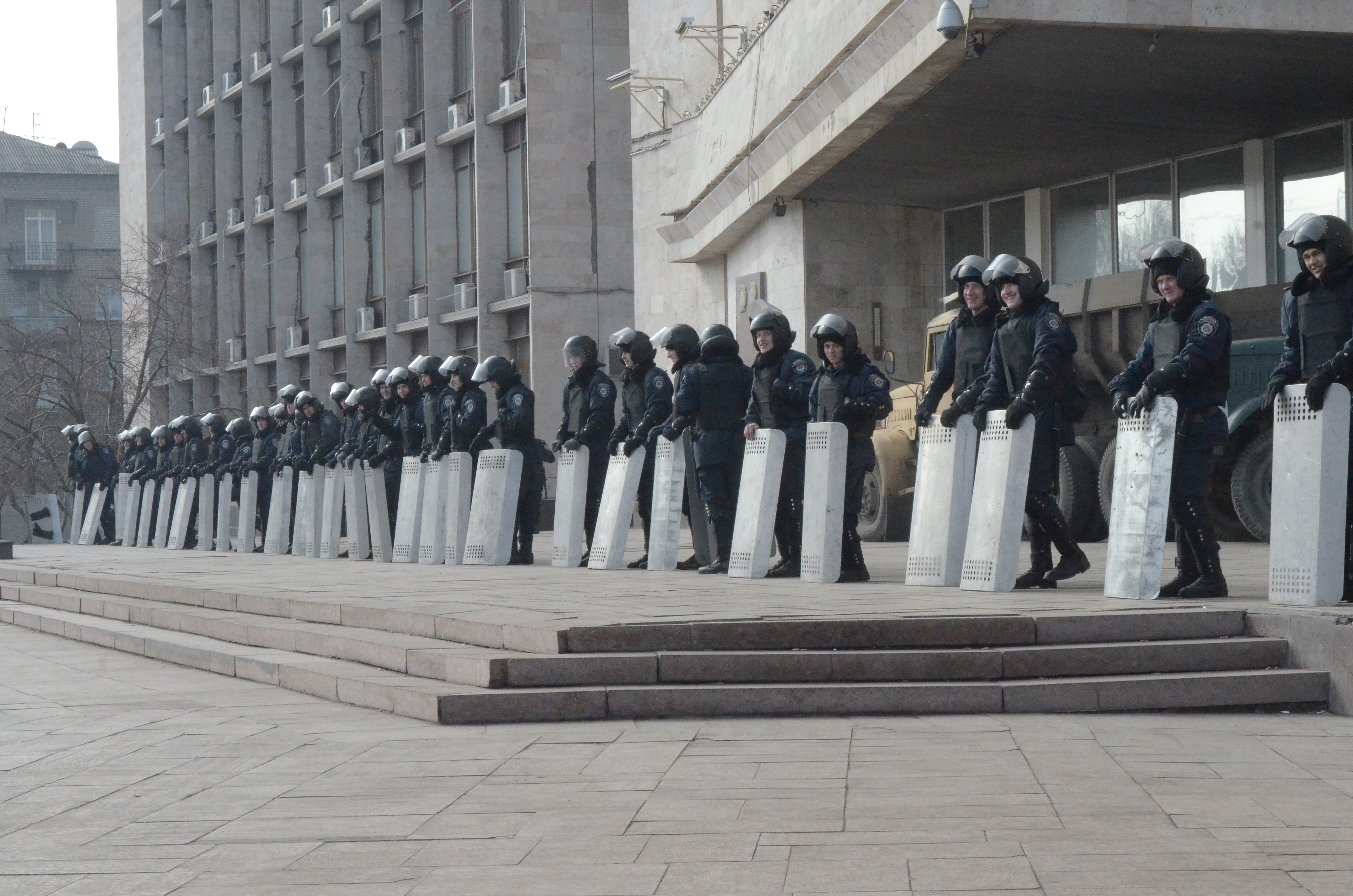 Донецкая облгосадминистрация